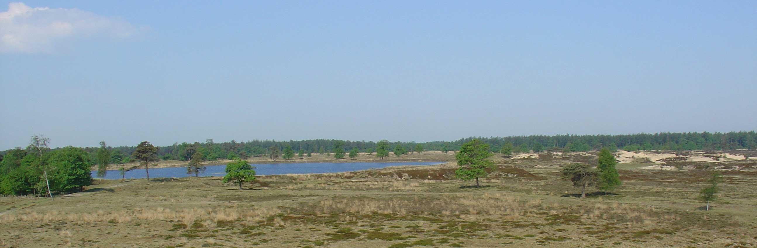 Grenspoel in Het Aekingerzand, stuifzandgebied in het Drents-Friese Wold